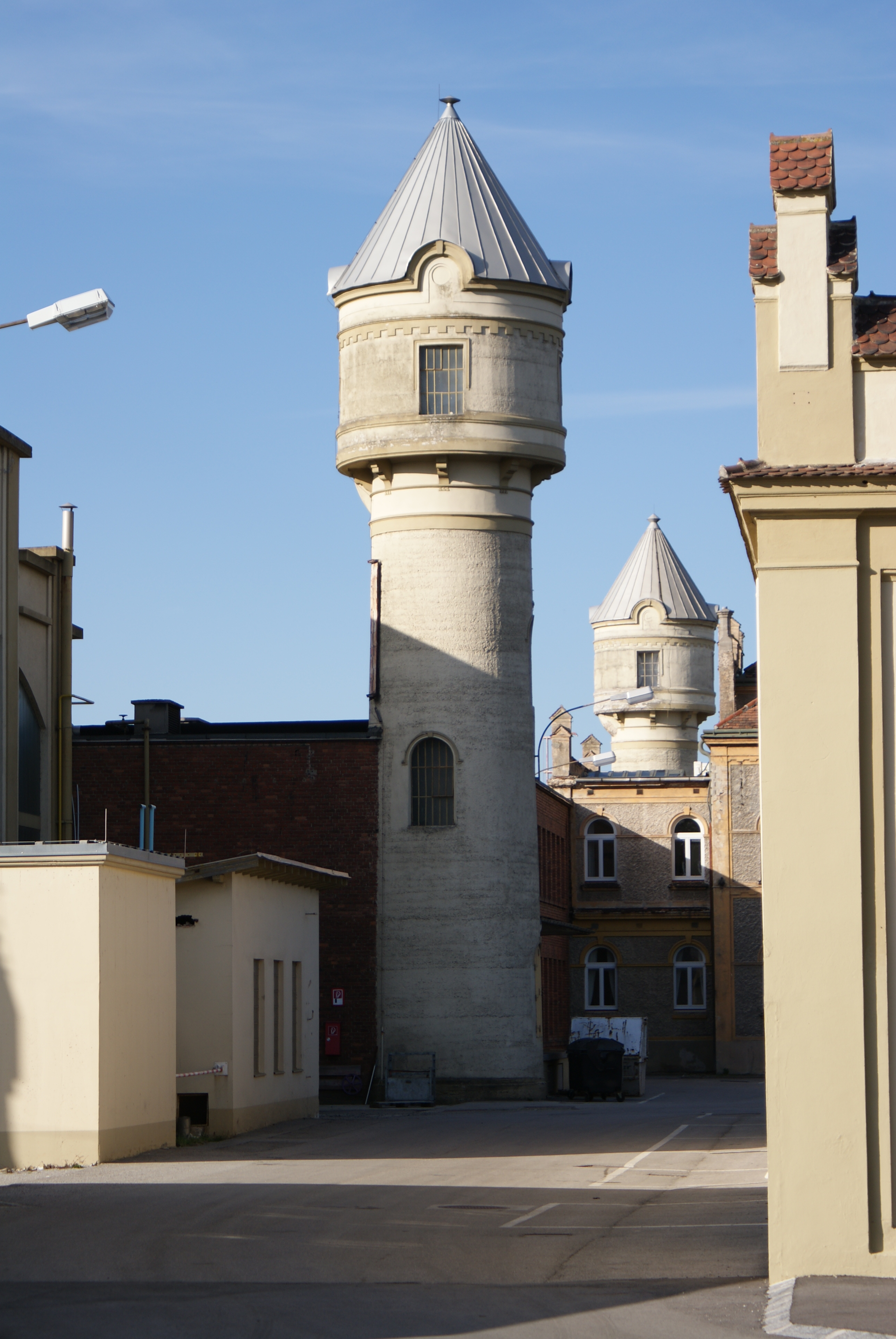 Zwei Wassertürme der Glanzstoff Austria